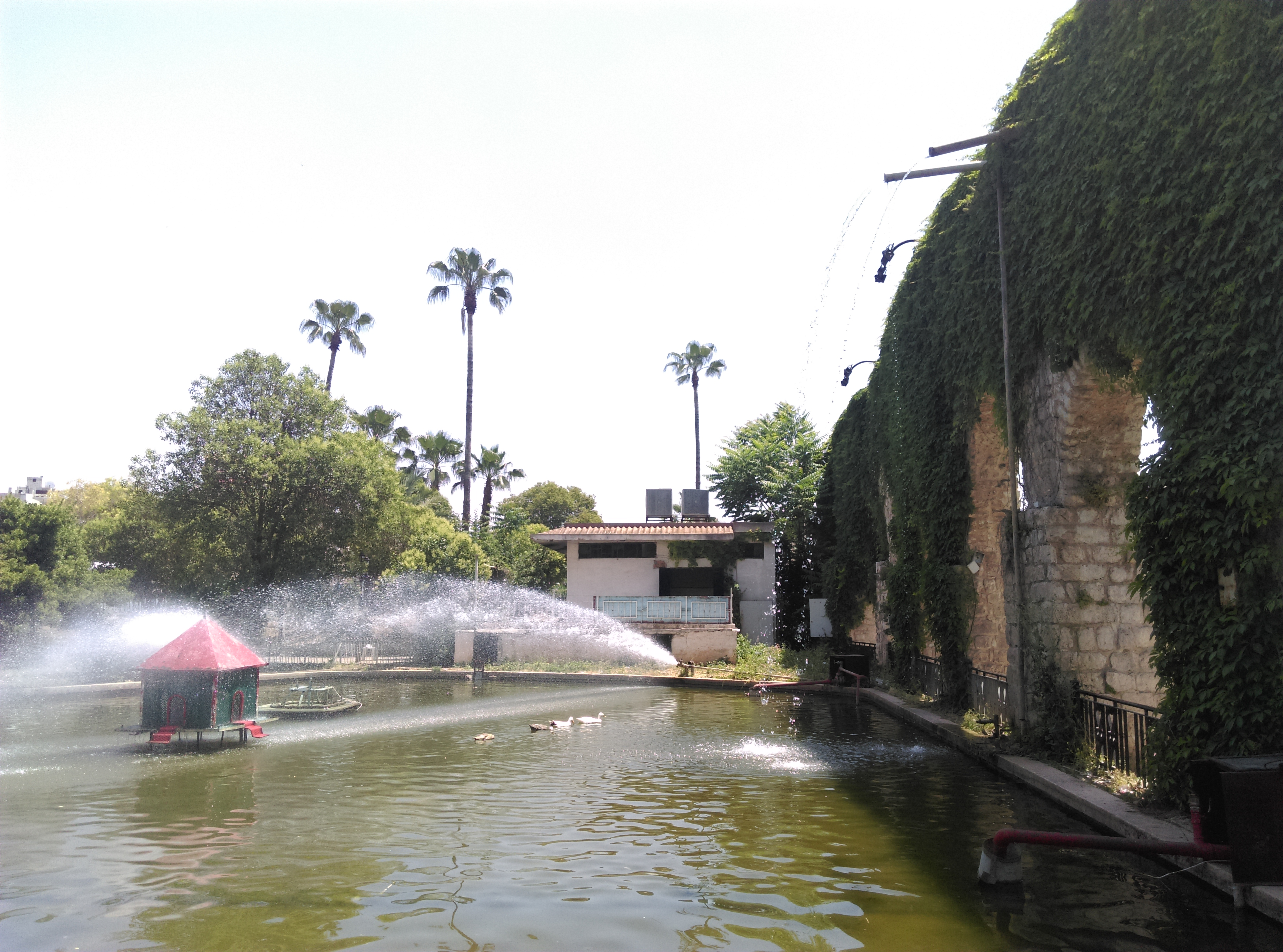 حديقة أم الحسن في حماة